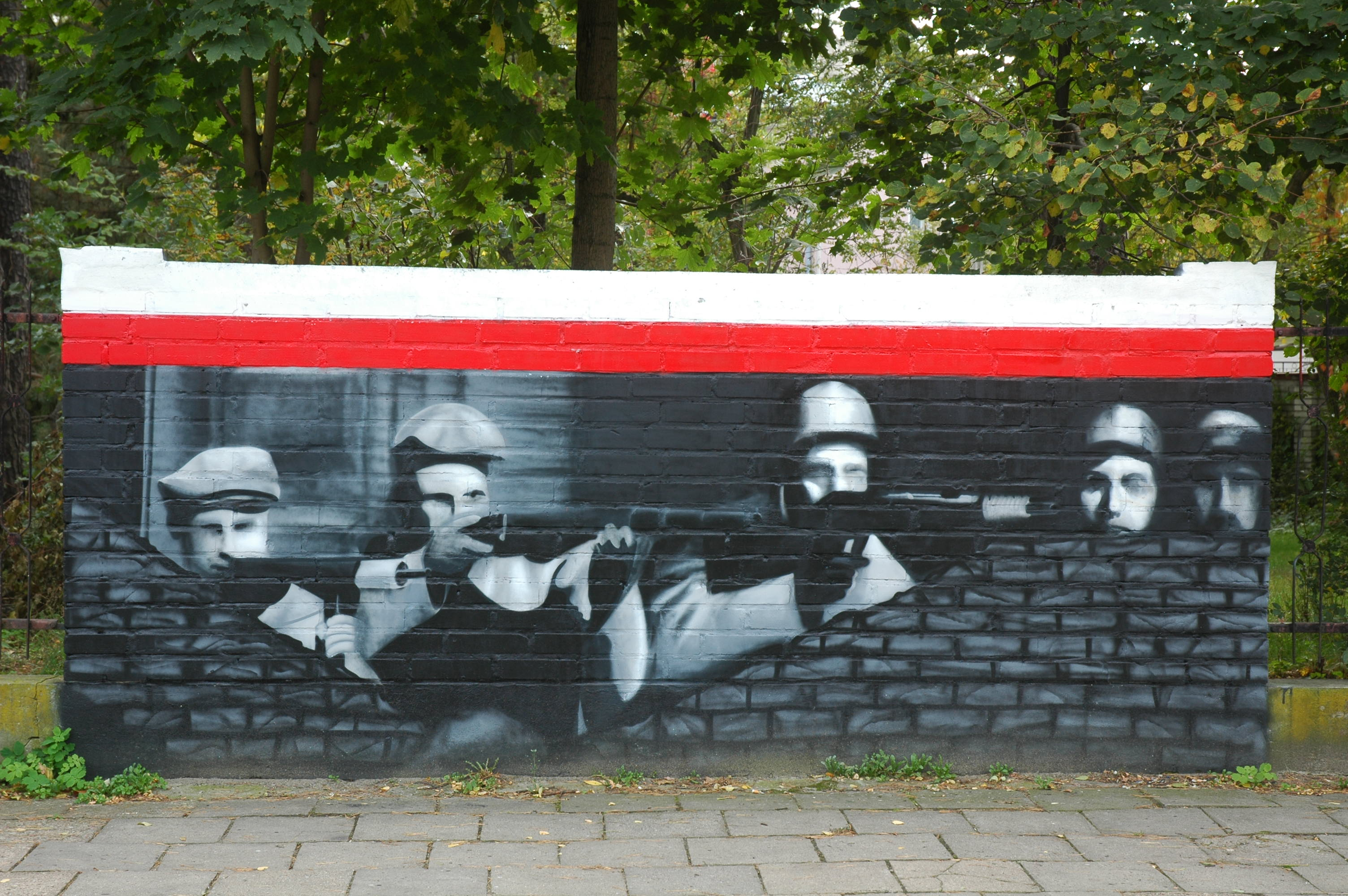 Legionowo - Mural powstańczy - róg Batorego i Siemiradzkiego fot. 6